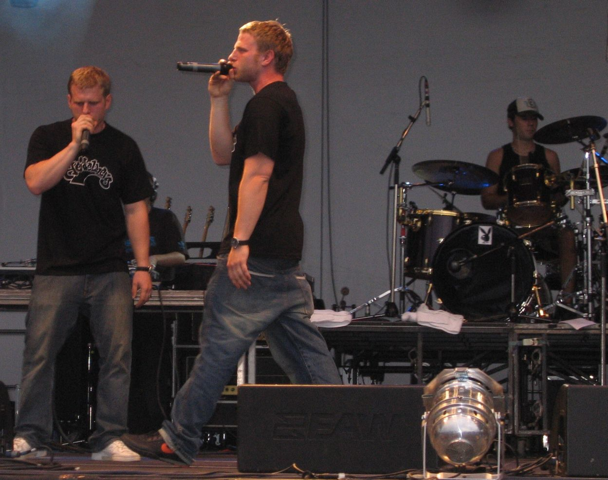 Die Stieber Twins im Vorprogramm von Wir sind Helden beim Open Air im Weinheimer Sepp-Herberger-Stadion